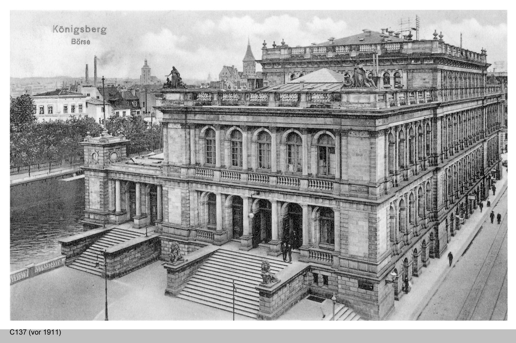 Neue Börse in Königsberg, Ostpreußen; erbaut 1870-1875